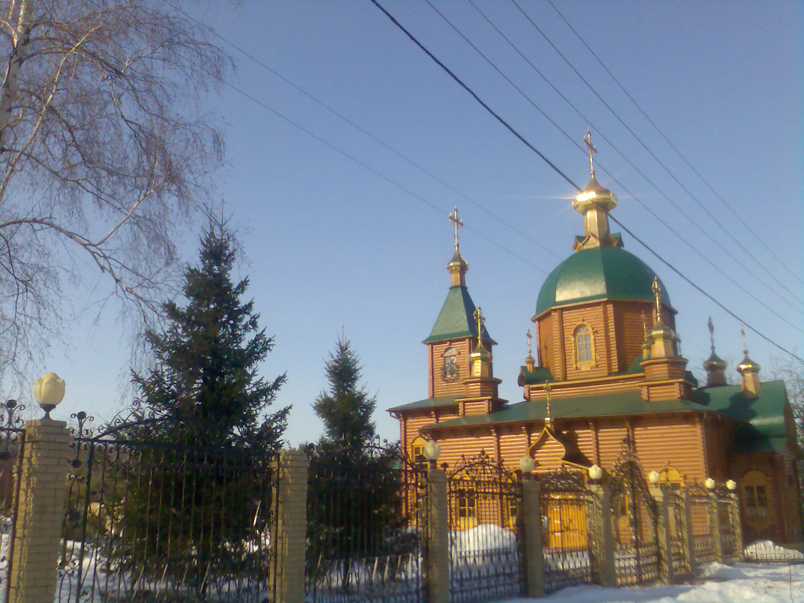 Свято-Вознесенський храм (м. Харків): Свято-Вознесенський храм (м. Харків)